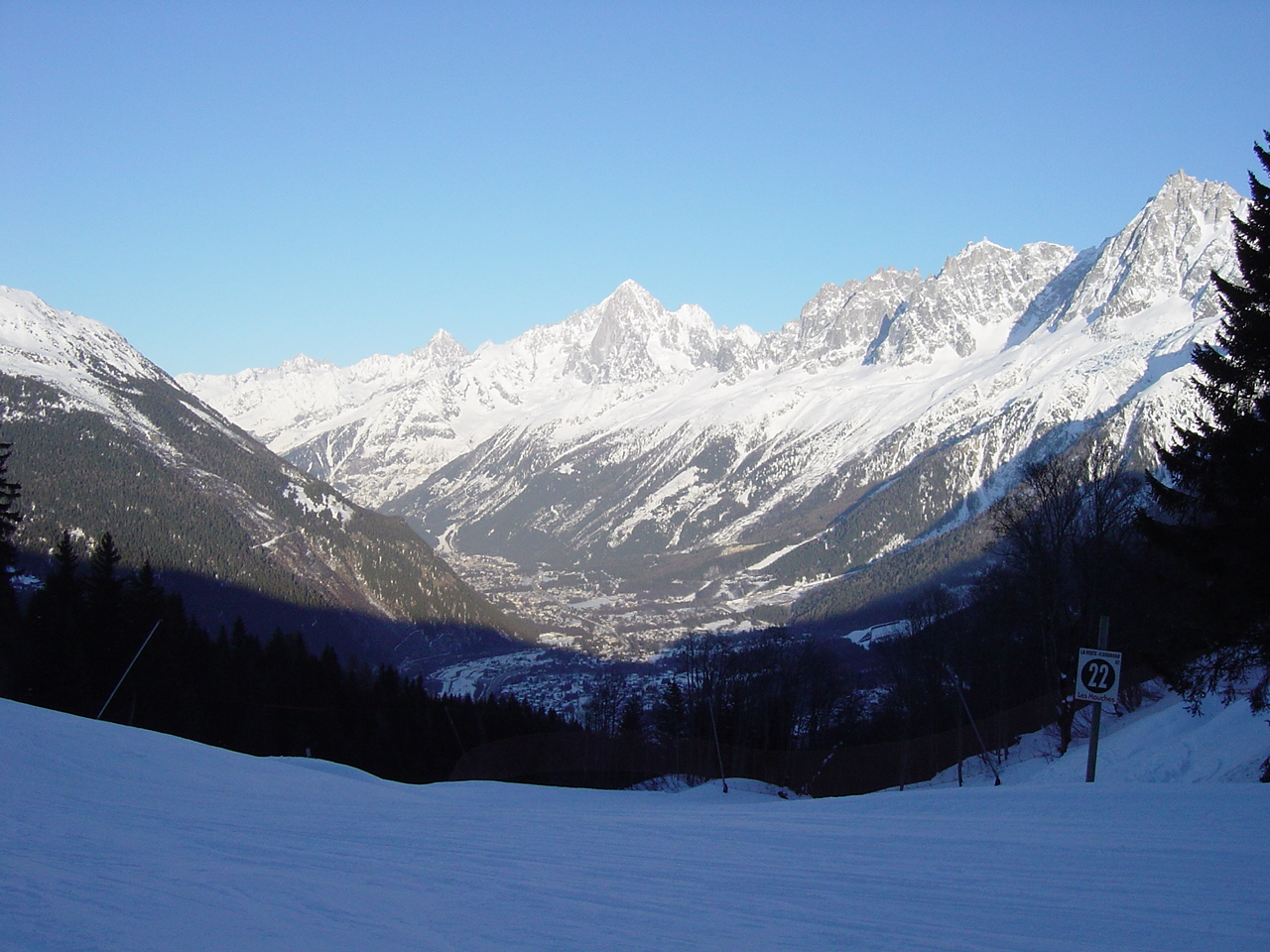 Ski resort